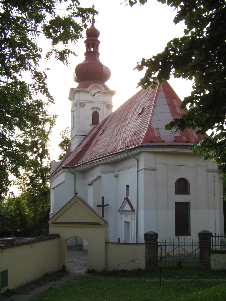 Kostel svatého Mikuláše v Ostravě-Porubě; Saint Nicholas church in Ostrava.